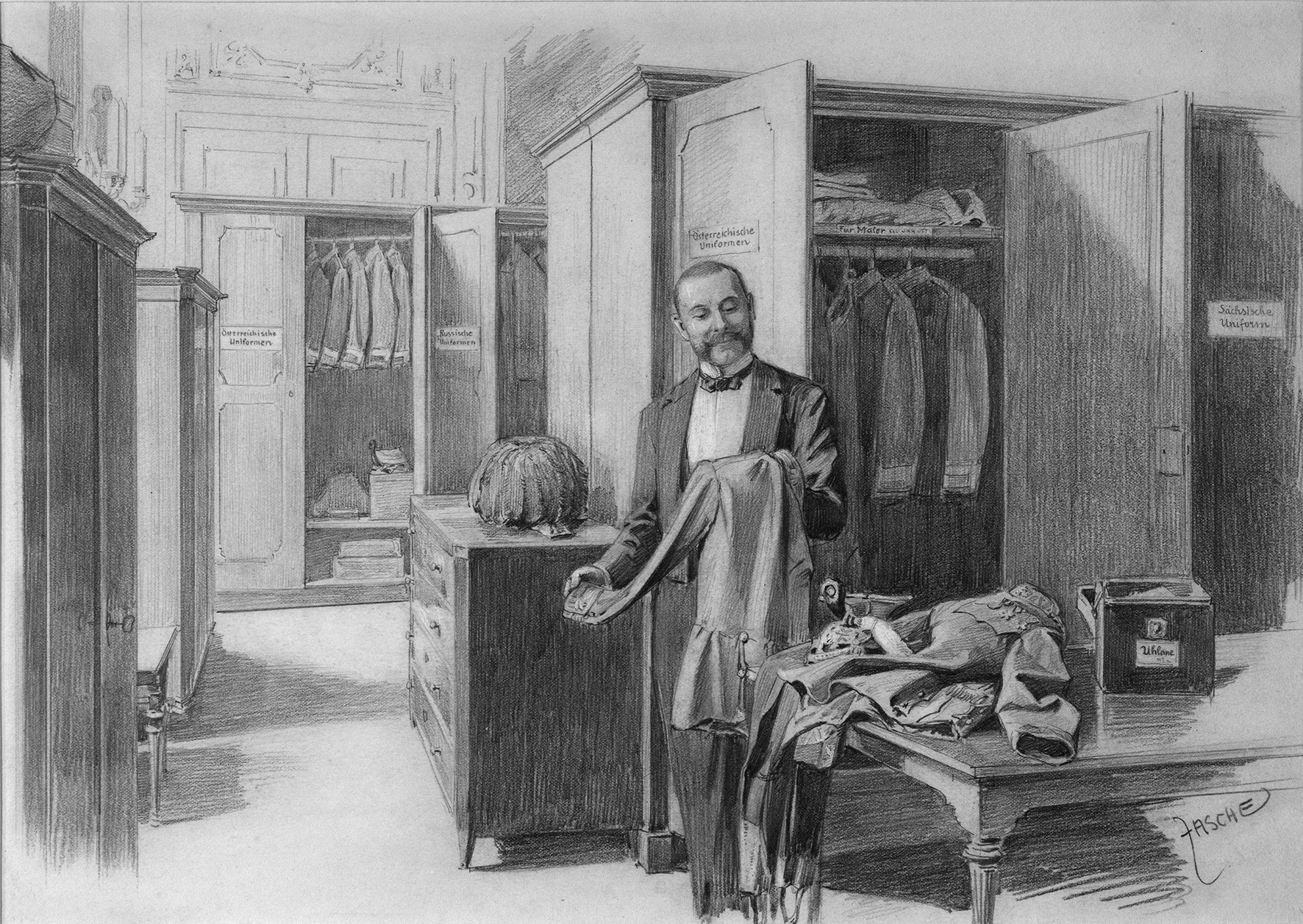 Der Kammerdiener Eugen Ketterl bei seiner Arbeit in der Uniformengarderobe Franz Josephs I Bleistiftzeichnung vor 1898